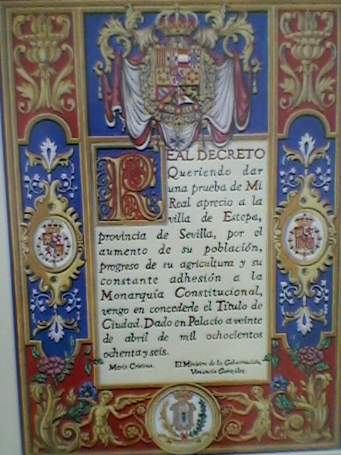 Cerámica colocada en el Ayuntamiento de Estepa conmemorando el 125 aniversario de la proclamación de Estepa como ciudad